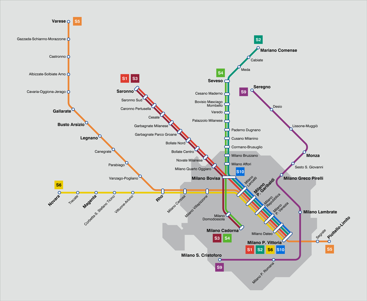 Mappa del servizio ferroviario suburbano di Milano ("Linee S"), status dicembre 2004